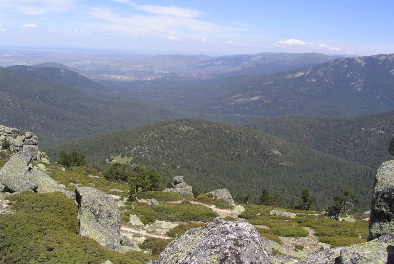 Vista general del valle de Valsaín. La imagen está tomada desde la cima de Siete Picos, y en ella se aprecia el bosque de pino silvestre que se extiende por todo el valle y por las laderas de los montes de Valsaín. Tras el bosque, en la zona más baja y septentrional del valle está el pueblo de Valsaín, perteneciente al municipio segoviano de La Granja de San Ildefonso. El valle de Valsaín es uno de los más grandes e importantes de la Sierra de Guadarrama y se situa enteramente dentro de la provincia de Segovia (España).